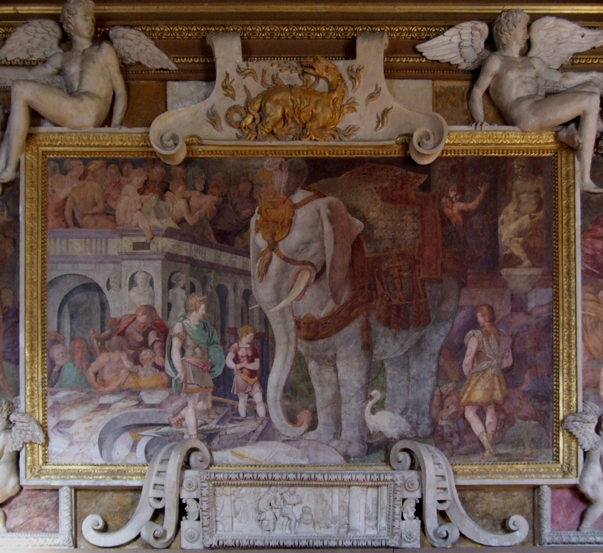 Francois I Gallery, Château de Fontainebleau, France